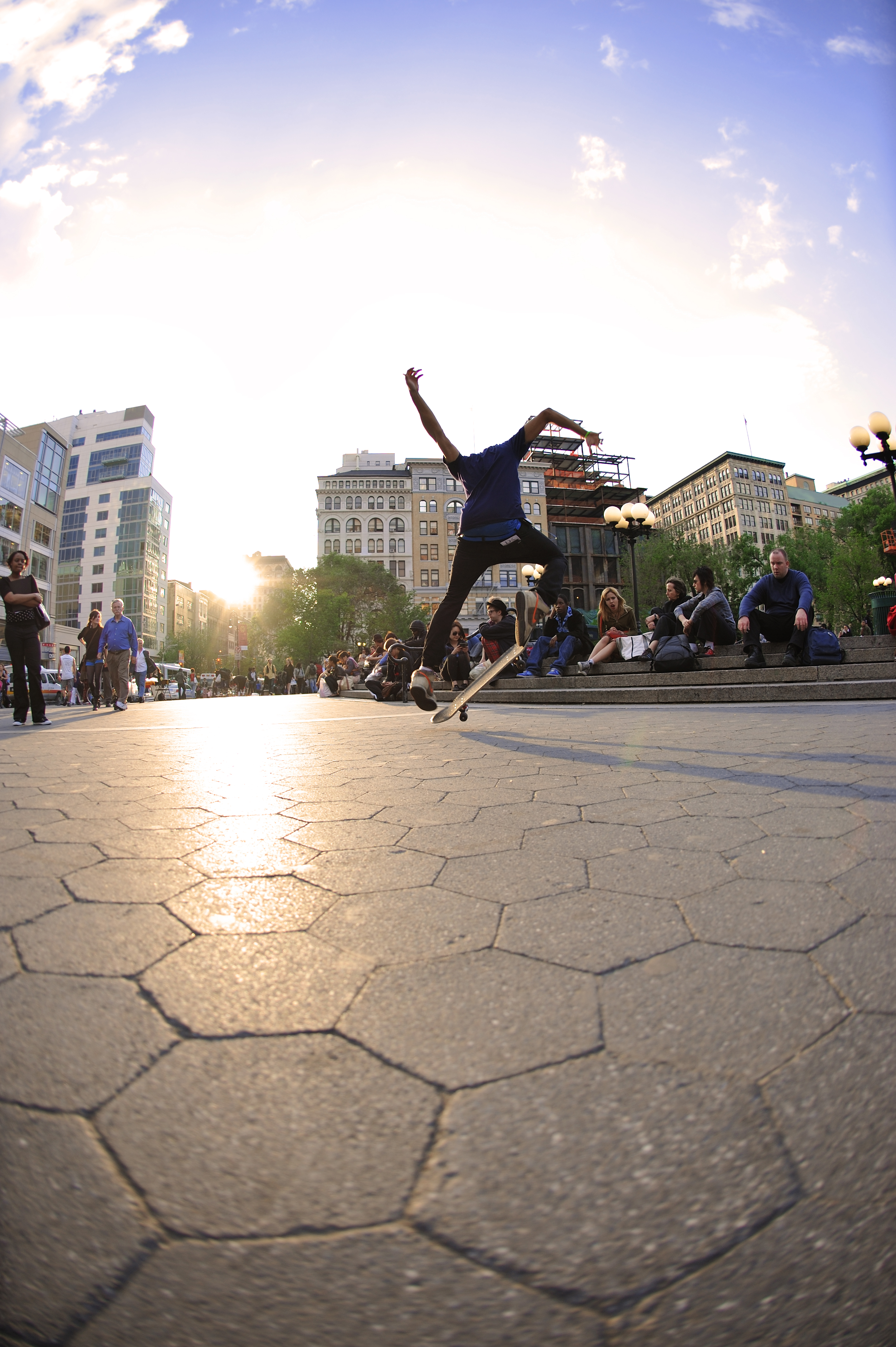 A Skateboarder in NYC.